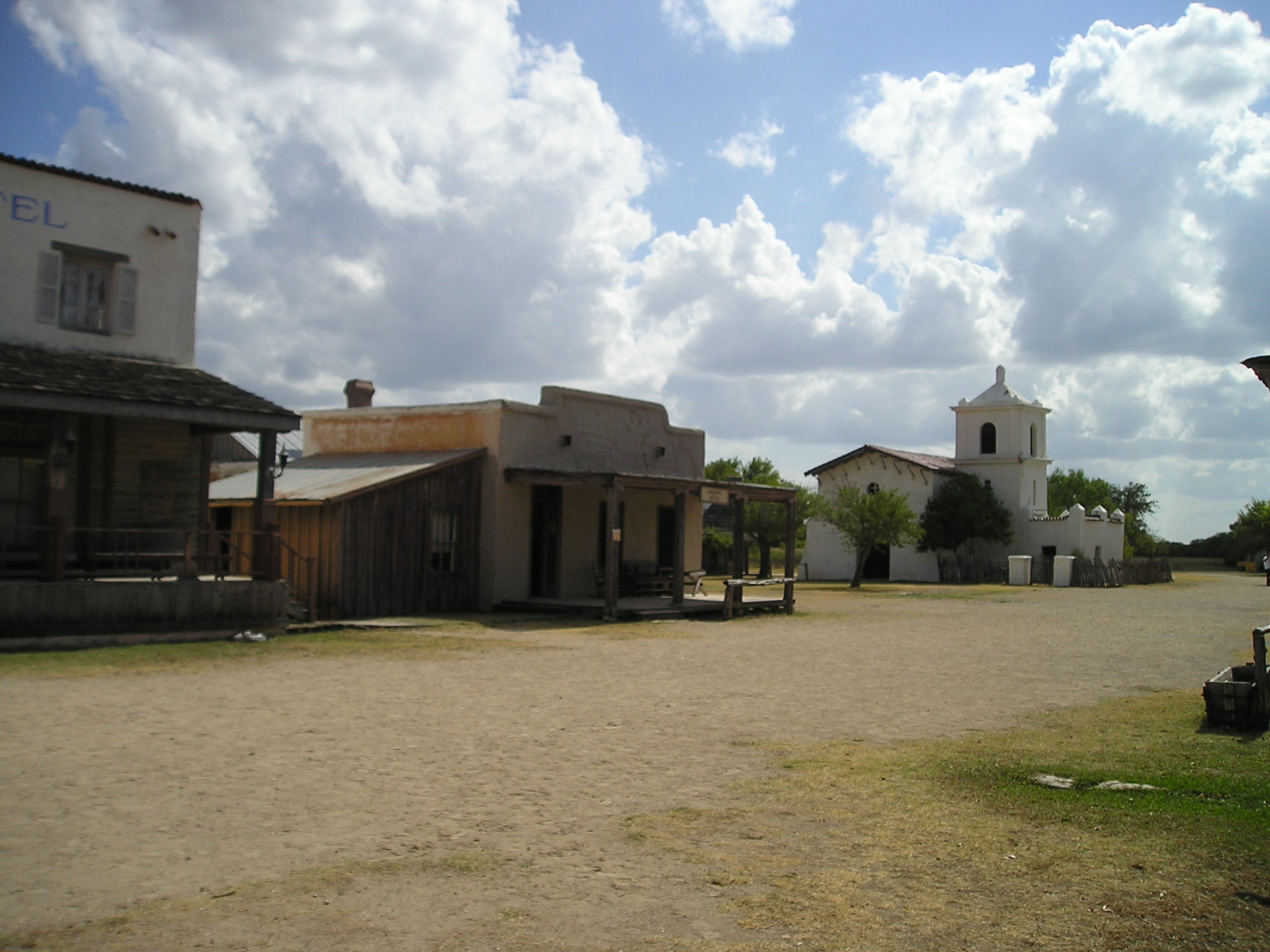 Alamo Village, Brackettville, Texas